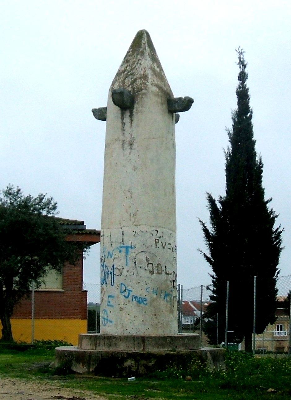 En Garrovillas (Cáceres, España) se conserva un rollo jurisdiccional de tipología sencilla.